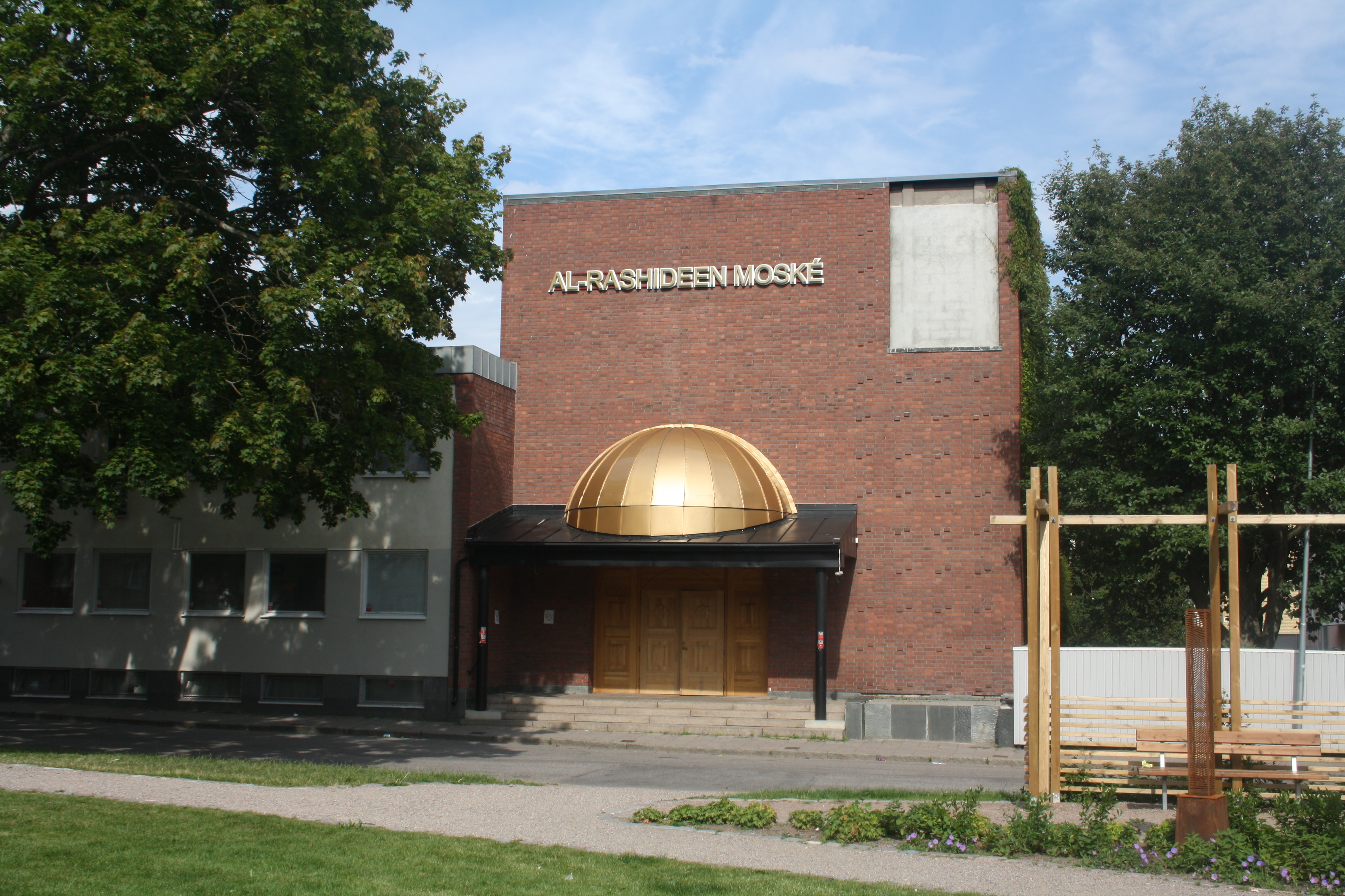 al-Rashideen-moskén i juli 2016